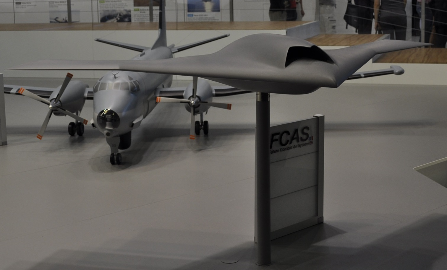 Maquette du Future Combat Air System Paris (Système de combat aérien futur) au stand de Dassault Aviation au Salon du Bourget 2015. Au second pan : un Atlantique 2